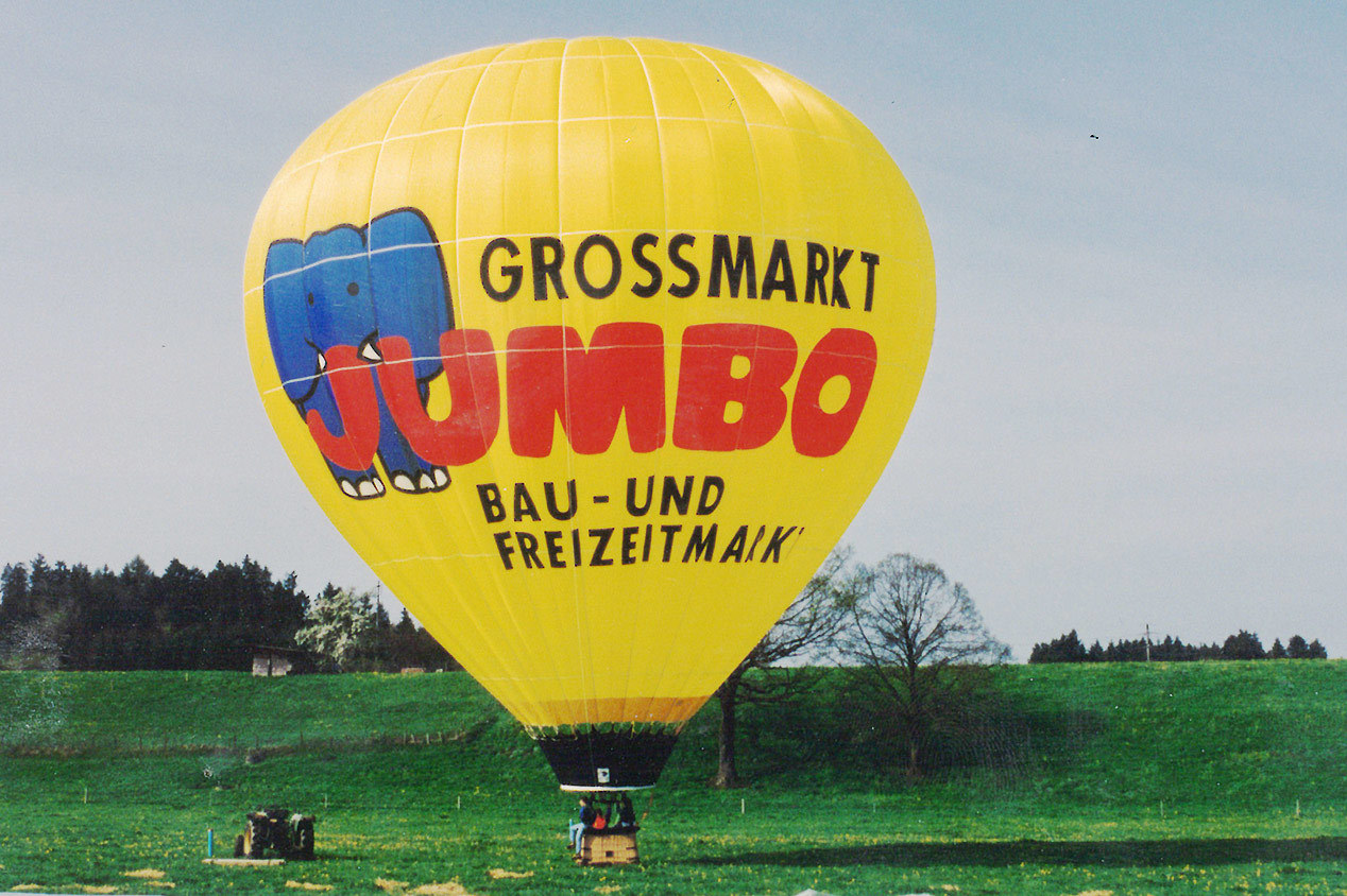 Der schweizweit bekannte gelbe Jumbo-Heissluftballon, Mai 1995